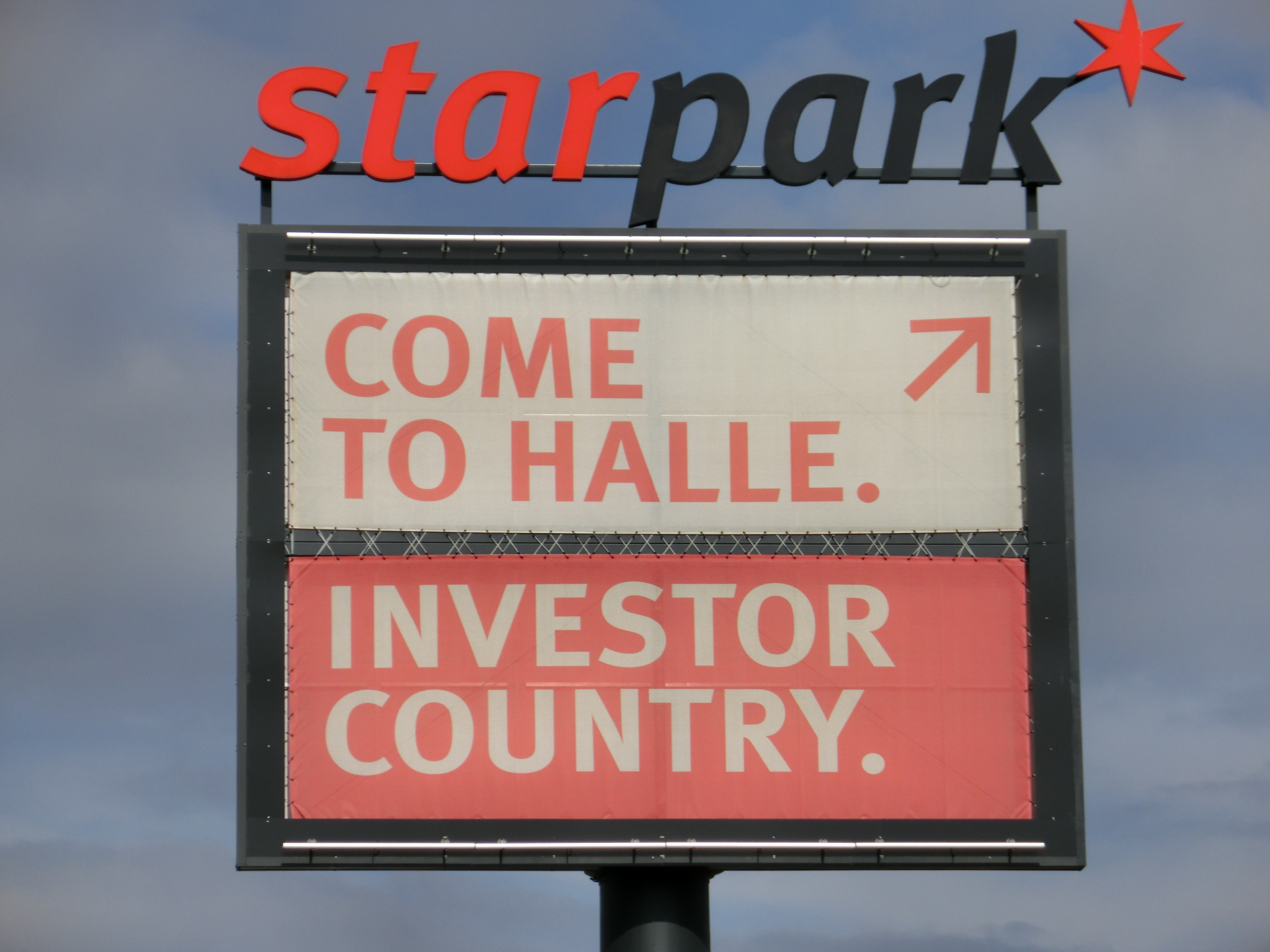 Industriegebiet Halle-Saalkreis an der A14 - Star Park Großer Werbeaufsteller an der Orionstraße der von der Autobahn 14 gut sichtbar ist.